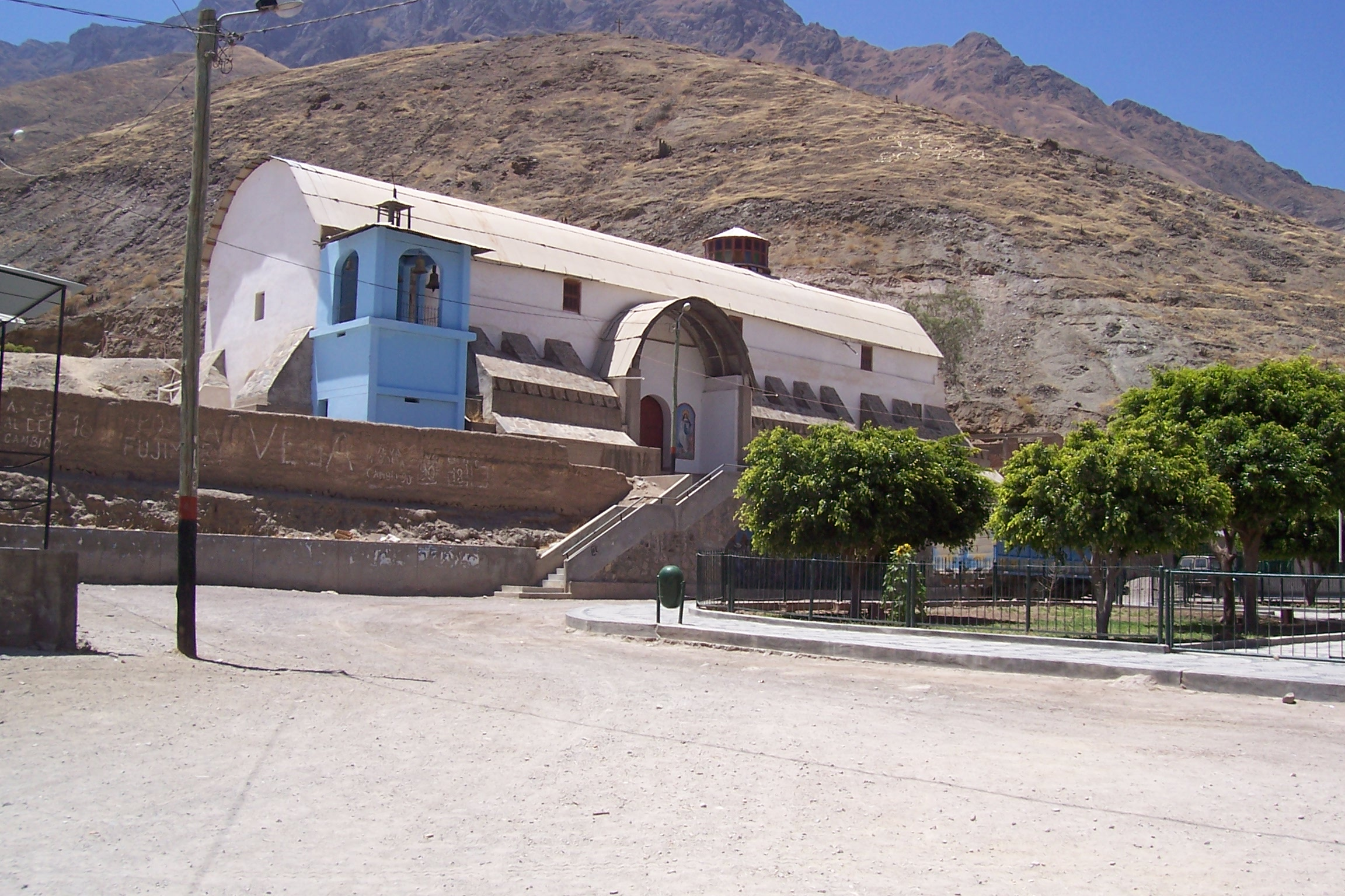 Iglesia de Viscas